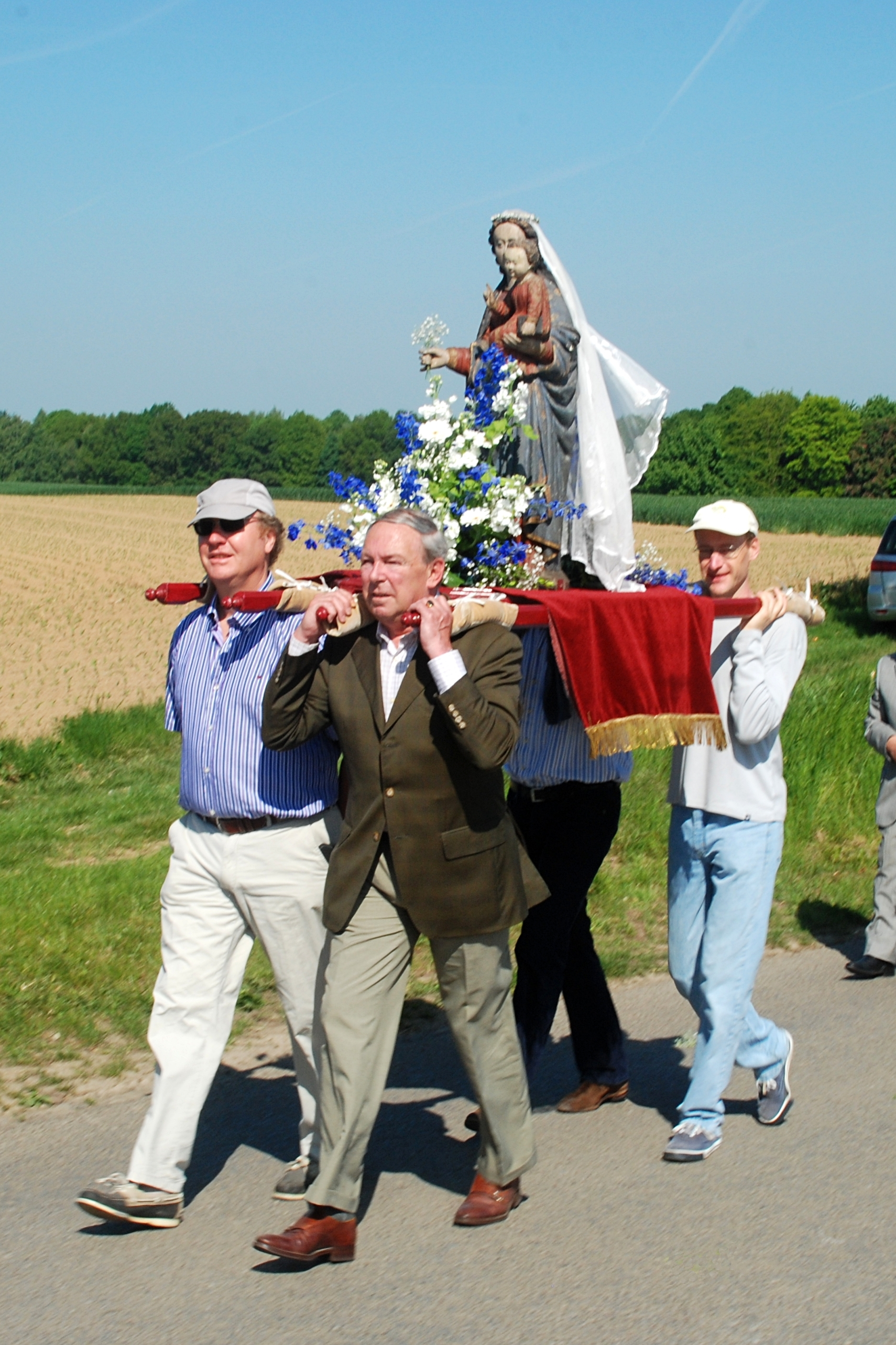 Belgique - Bousval - Chapelle du Try-au-Chêne - procession du lundi de Pentecôte